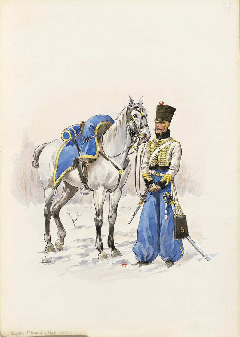 Brigadier en petite tenue du 5e Hussards en 1807.